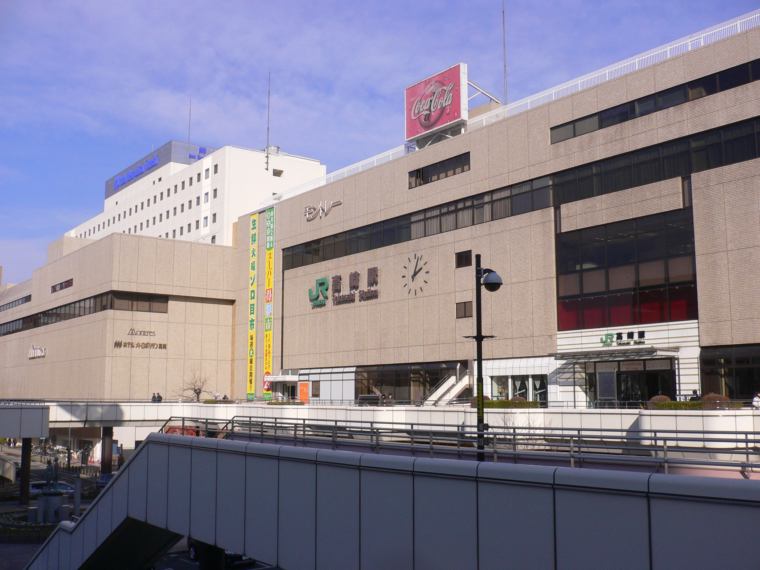 JR Takasaki